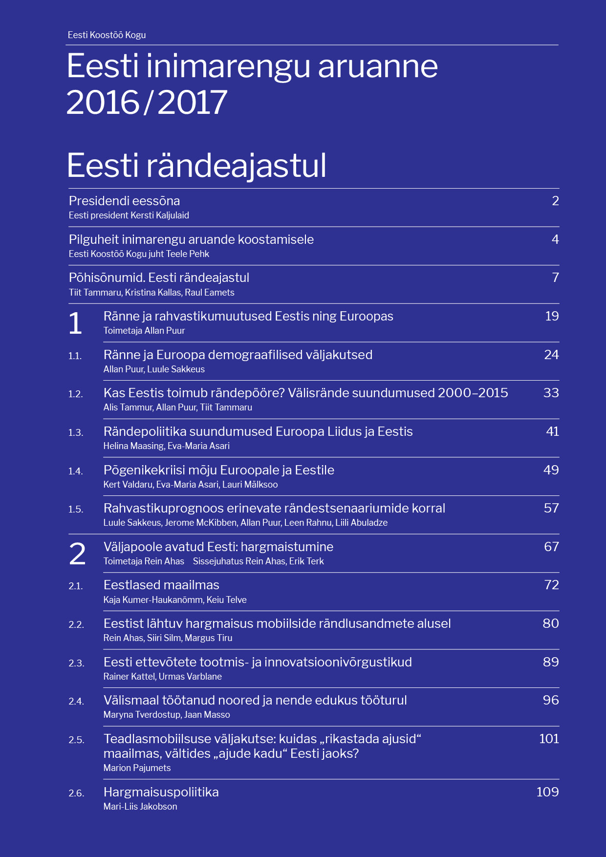 Eesti inimarengu aruande 2016-2017 "Eesti rändeajastul" esikaas